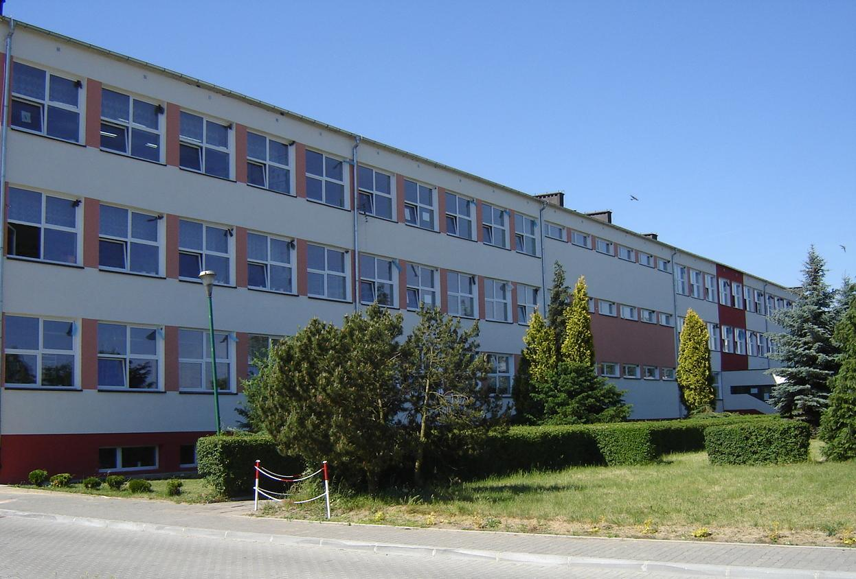 Zespół Szkół Publicznych w Suchaniu, autorka: H.Ciszewska-Czyż.